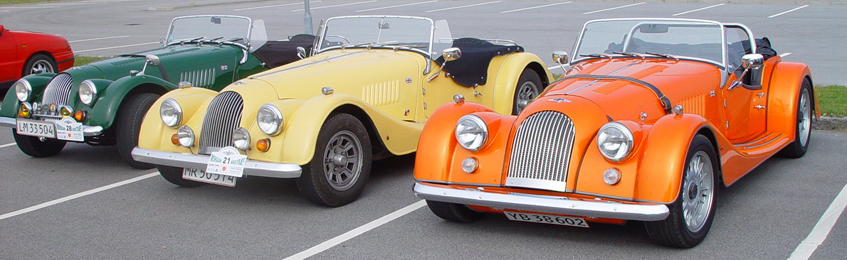 Flere Morgan biler.